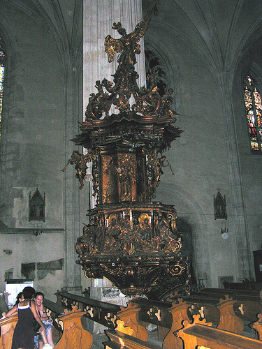 A kolozsvári Szent Mihály-templom szószéke, Pasztilla jóvoltából és engedélyével.